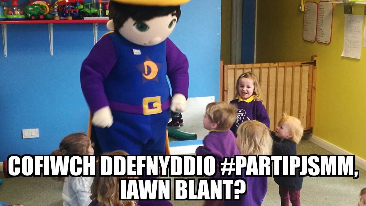 Dewin